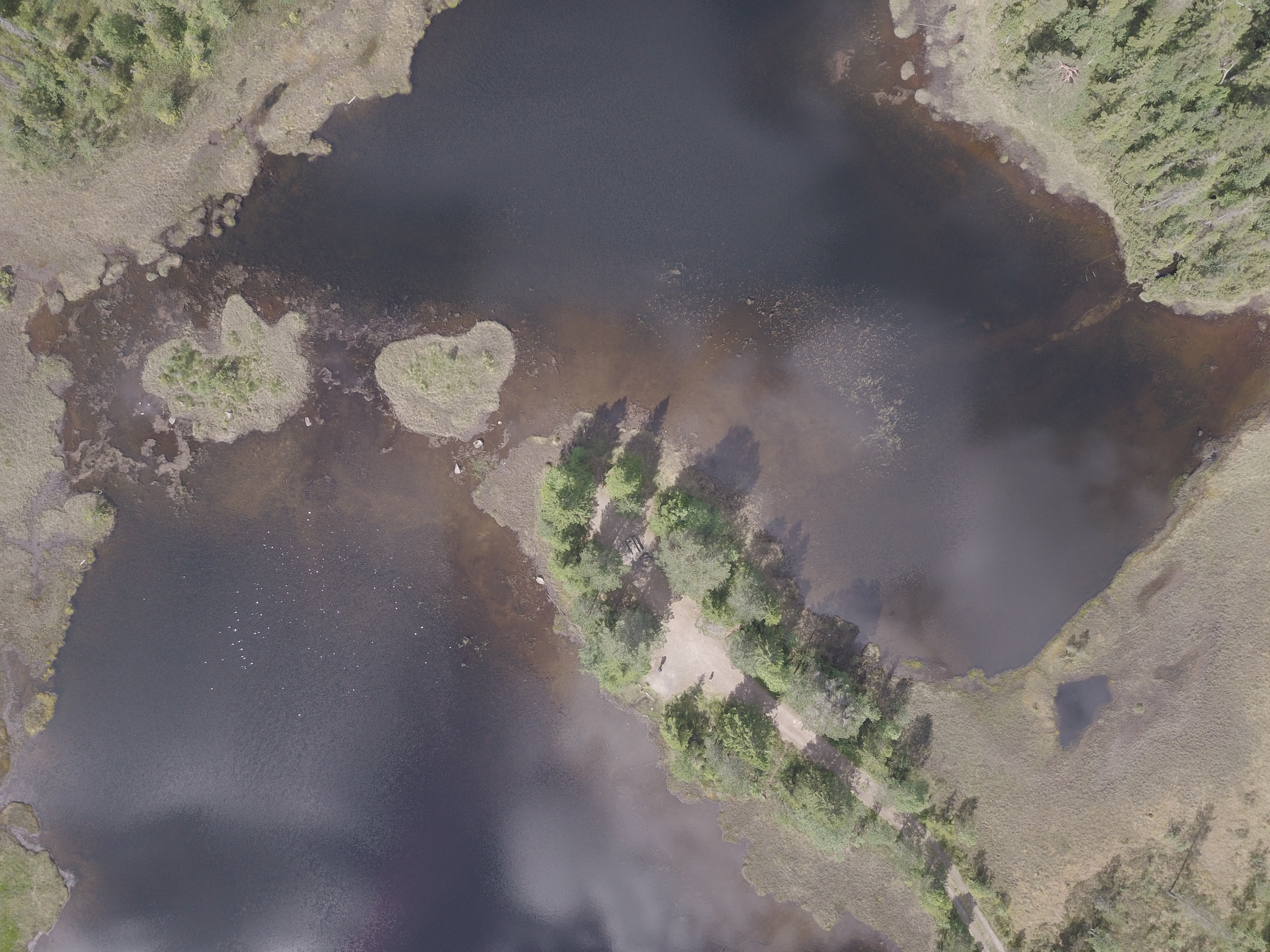 Tangetjernet i Romeriksåsen